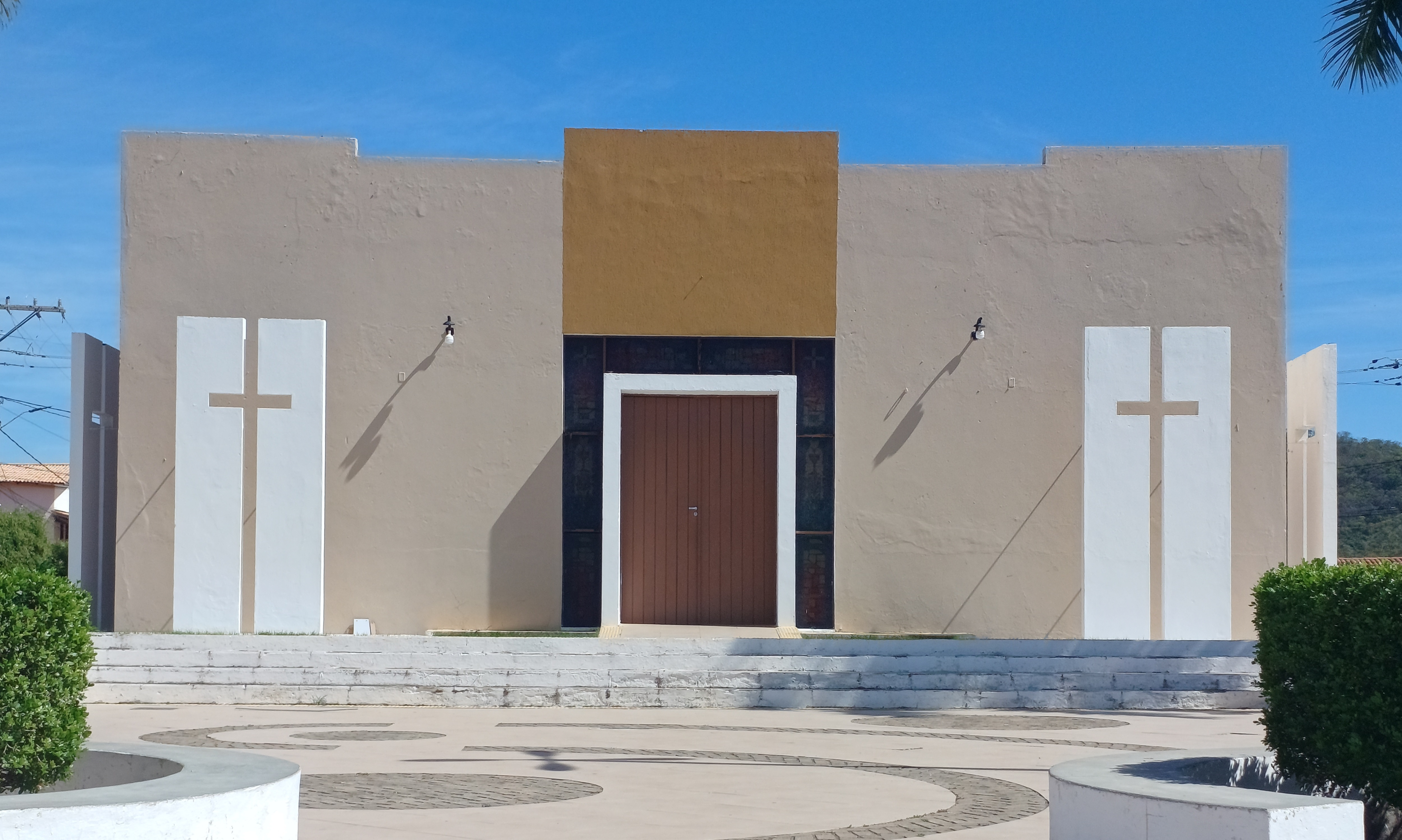 Capela de Nossa Senhora do Sagrado Coração, padroeira de Major Sales, Rio Grande do Norte (Brasil), que faz parte da paróquia Sant'Ana de Luís Gomes, da Diocese de Santa Luzia de Mossoró.